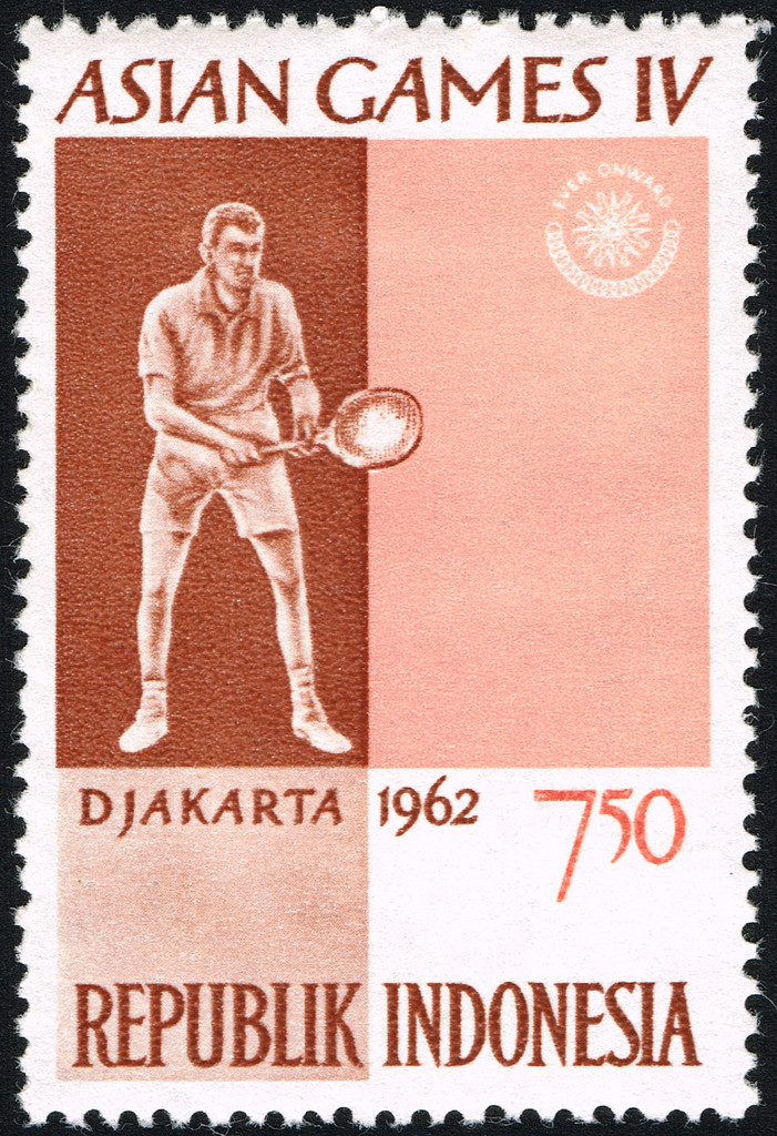 Asian Games IV